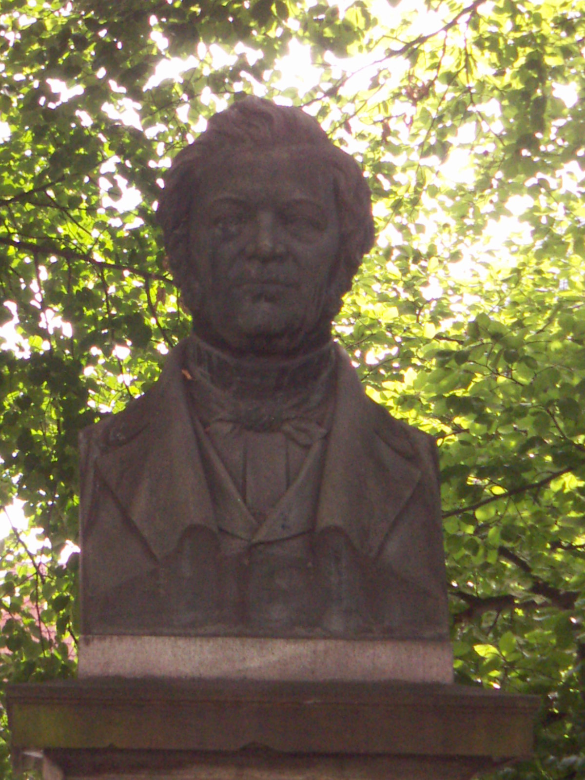 Statue von Friedrich Gottlob Schulze in Jena (D) / Monument of Friedrich Gottlob Schulze in Jena (D)